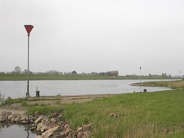 Betonning langs de IJssel bij Wijhe, eigen foto